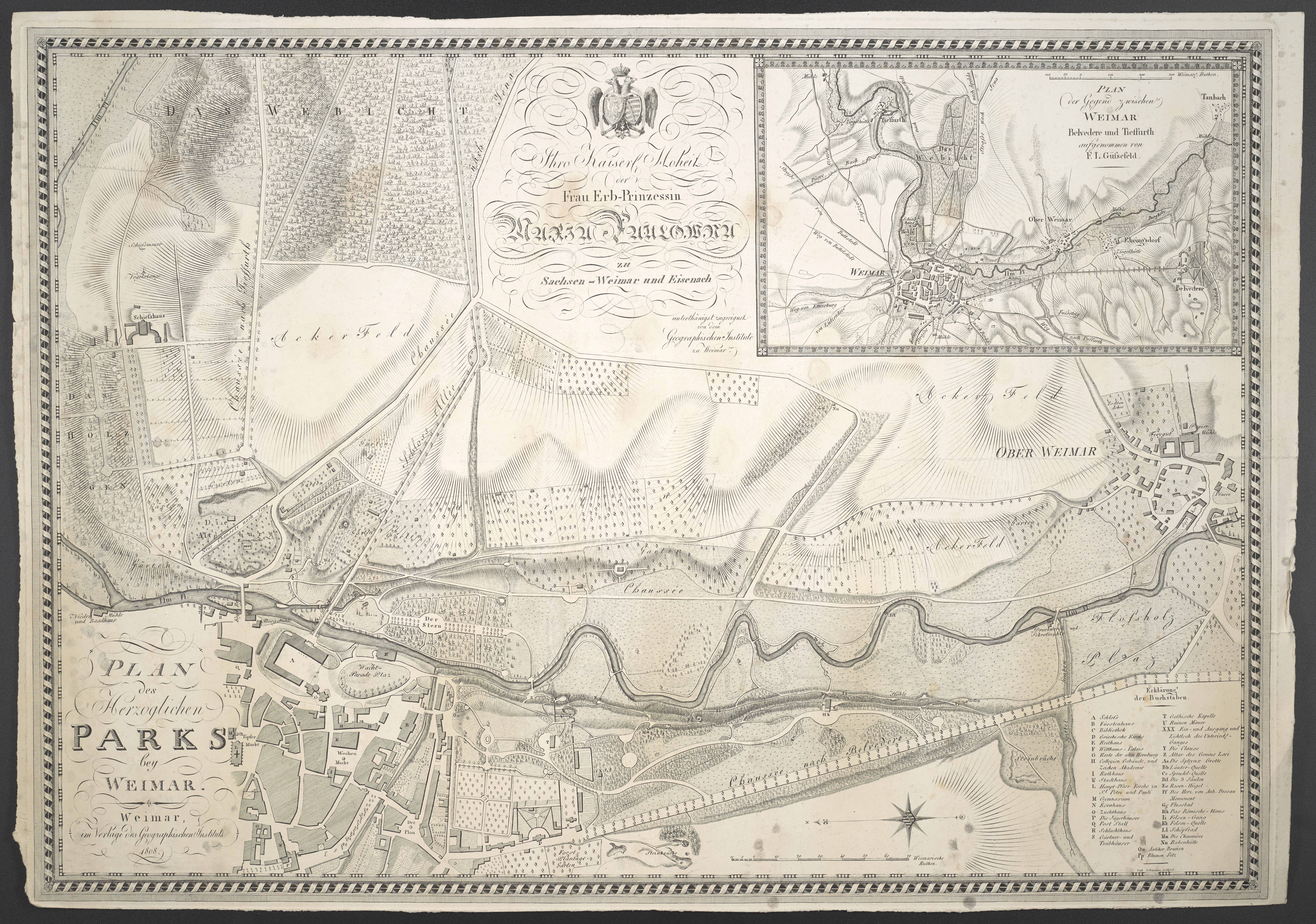 1 Pl. : unkolor. (70 x 50 cm) ; Koordinaten E 11°19'38"-E 11°21'09"/N 50°59'06"-N 50°57'51" ; Maßstab in graph. Form (Weimarische Ruthen). - Titel unten links. - Maßstab unten Mitte. - Erkl. der Buchstaben unten rechts. - Widmung und Wappen oben Mitte. - Ohne Kt.-Netz. - E oben. - Mit 1 Nebenkt.: Plan der Gegend zwischen Weimar, Belvedere und Tieffurth / Aufgenommen von F. L. Güssefeld. - Relief: Mit Bergstrichen und Einzelbäumen. - Namen und Beschreibungen dt.